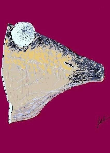 Paint